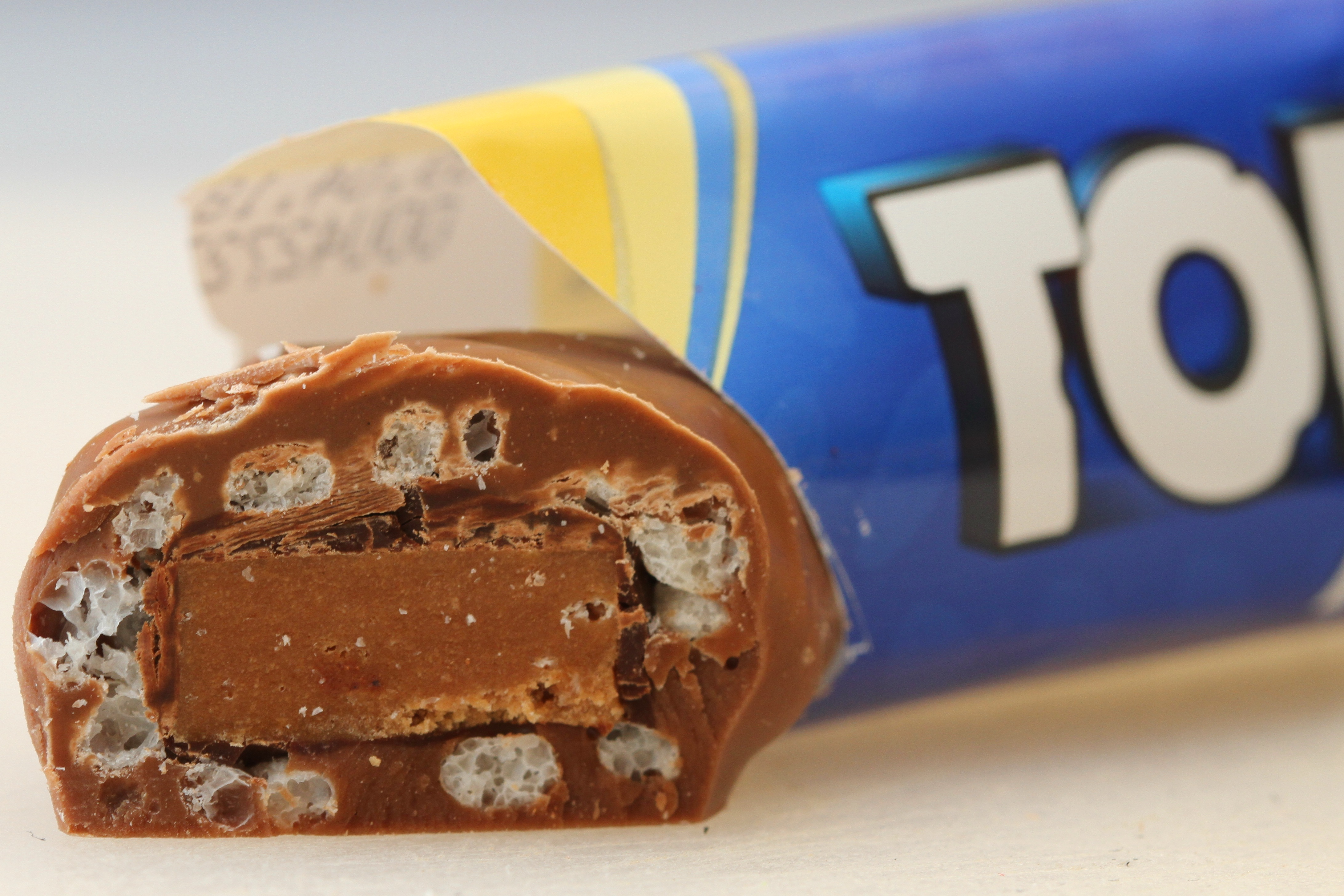 Sjokoladen Toppris.